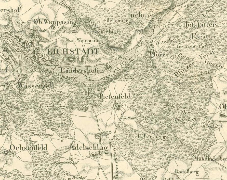 Ausschnitt aus dem 1806 in Paris entstandenen Blatt I 10 der „Carte de la Bavière“, die auf Initiative von Napoleon entstand.